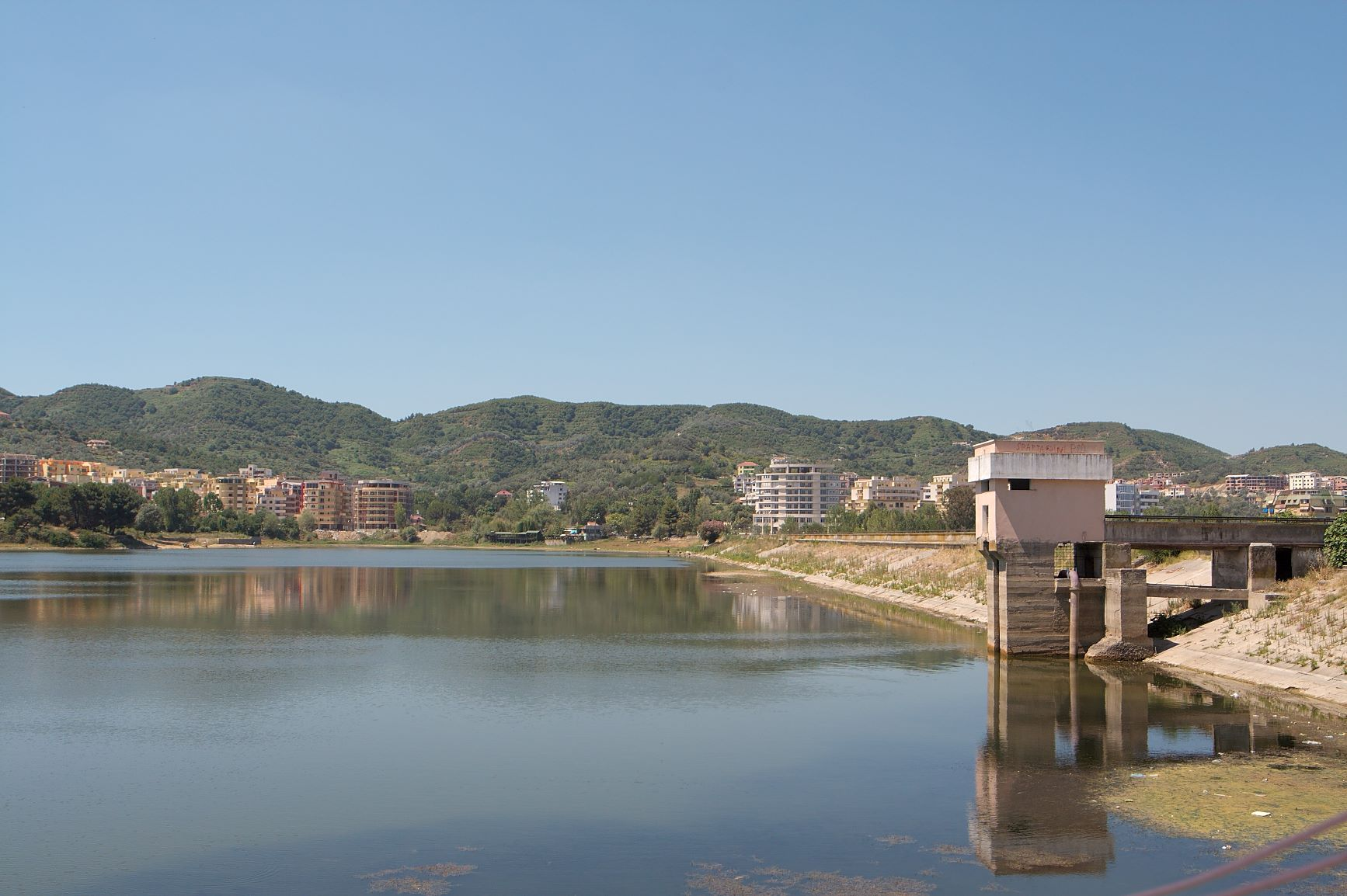 Taken in Tirana, Albania